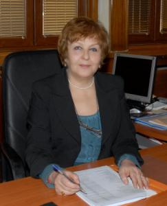 Декан Проф. д-р Мариела Оджакова